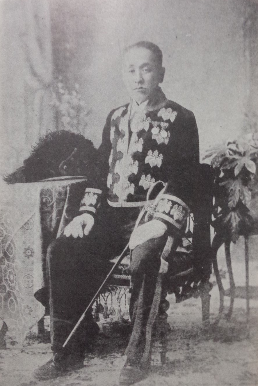 松平信庸の肖像写真。